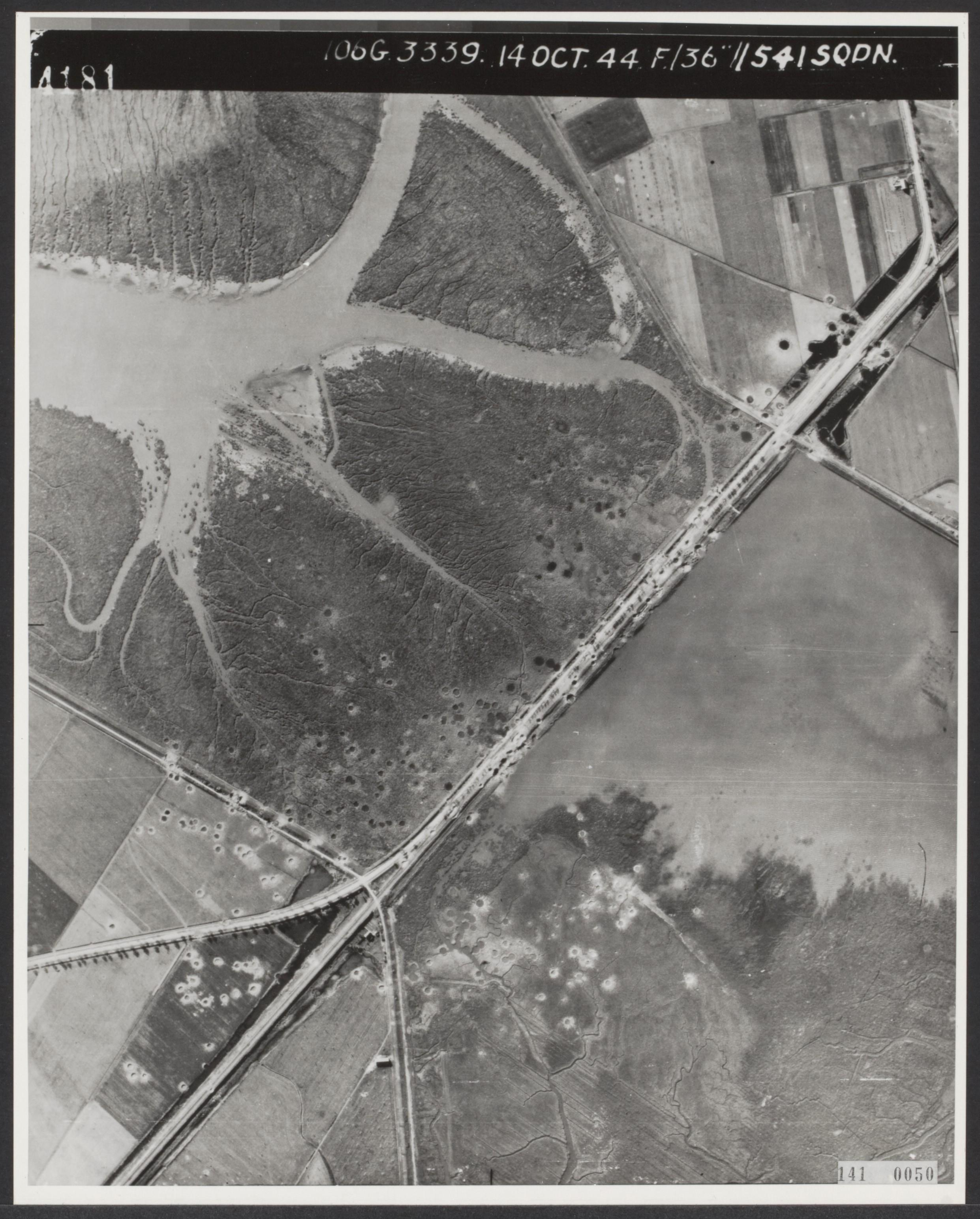 Luchtopname. De gebombardeerde Sloedam